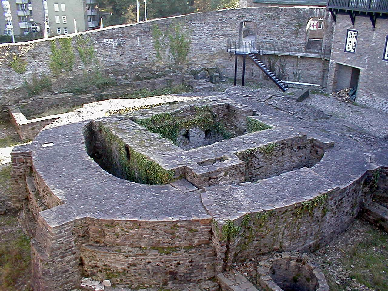 Bergfried Broich